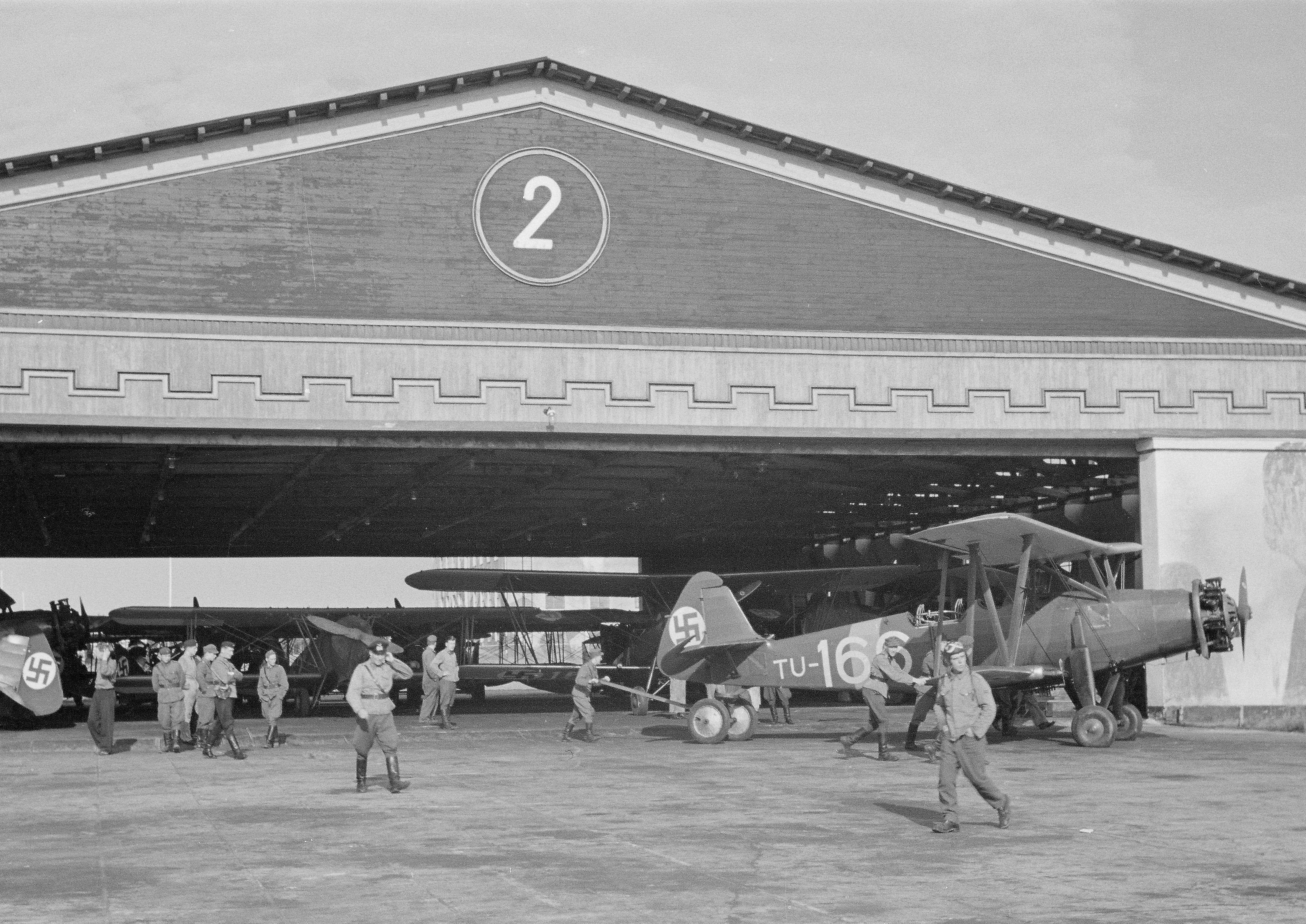 LeSK:n Tuiskuja tuodaan hallista Kauhavalla lentopalvelukseen.